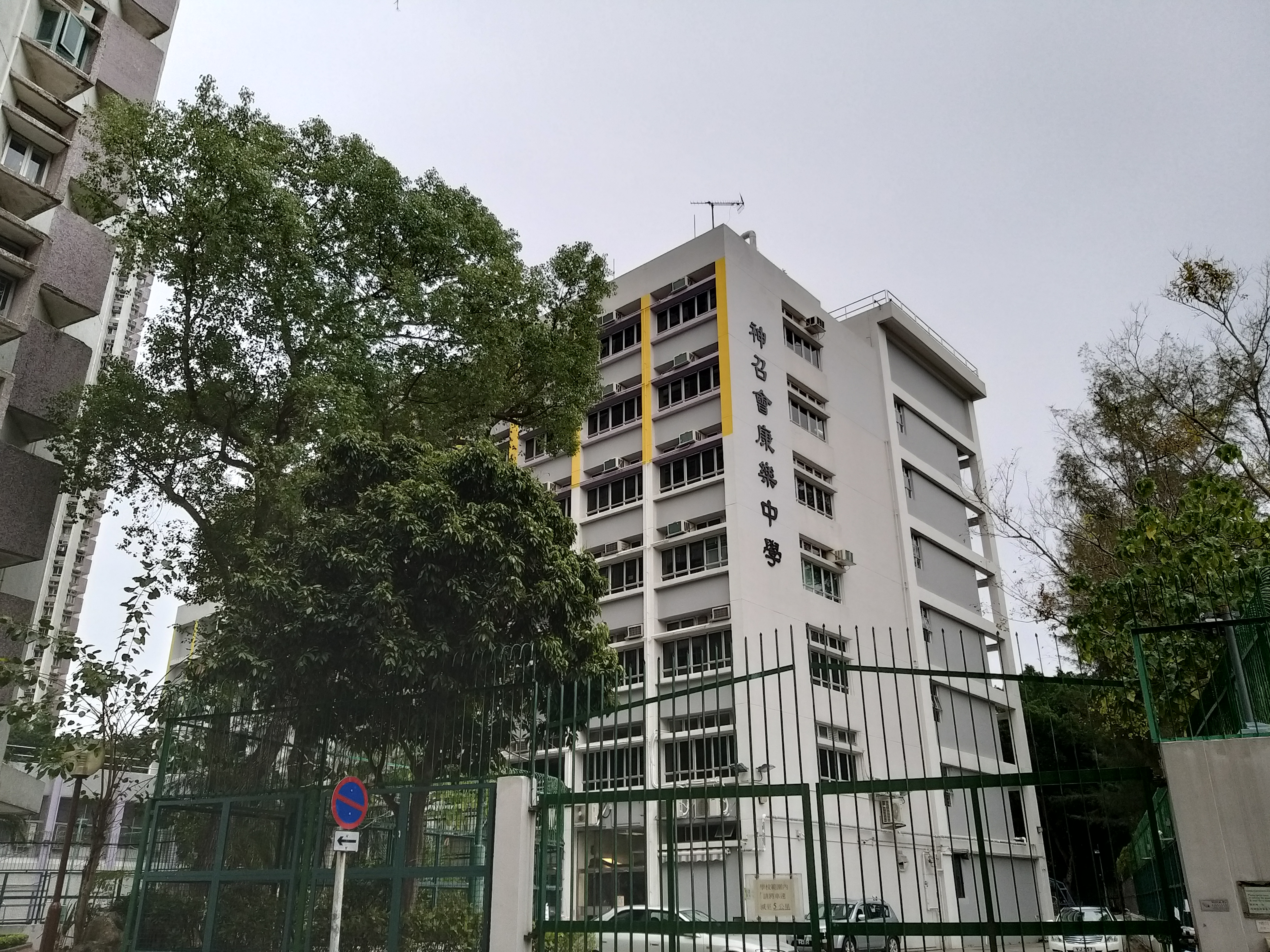 面向林村河的康樂中學車道入口